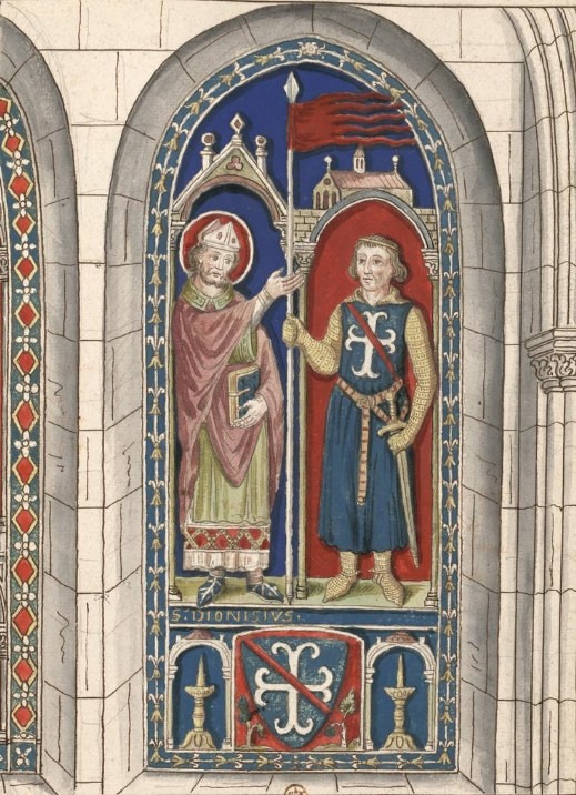 Henri II Clément, seigneur du Mez et d'Argentan, maréchal de France